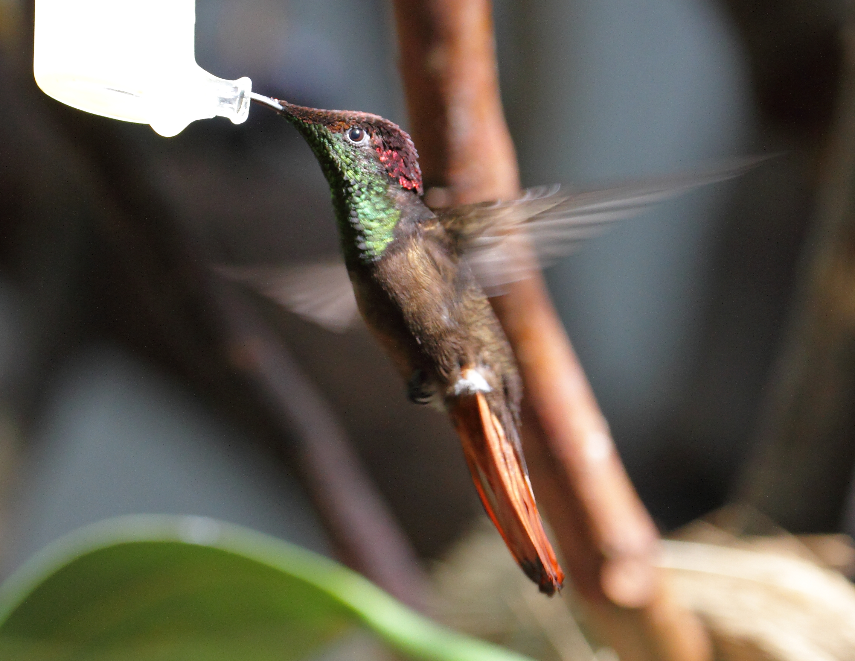 Ein Moskitokolibri im Tiergarten Schönbrunn.